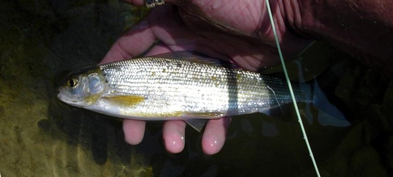 obrázek lipana podhorního z enwiki Photo by cs::fr:Utilisateur:Liondelyon, May 2004. Adapted from cs::fr:Image:Ombre.JPG (by cs::de:User:Tkinias)